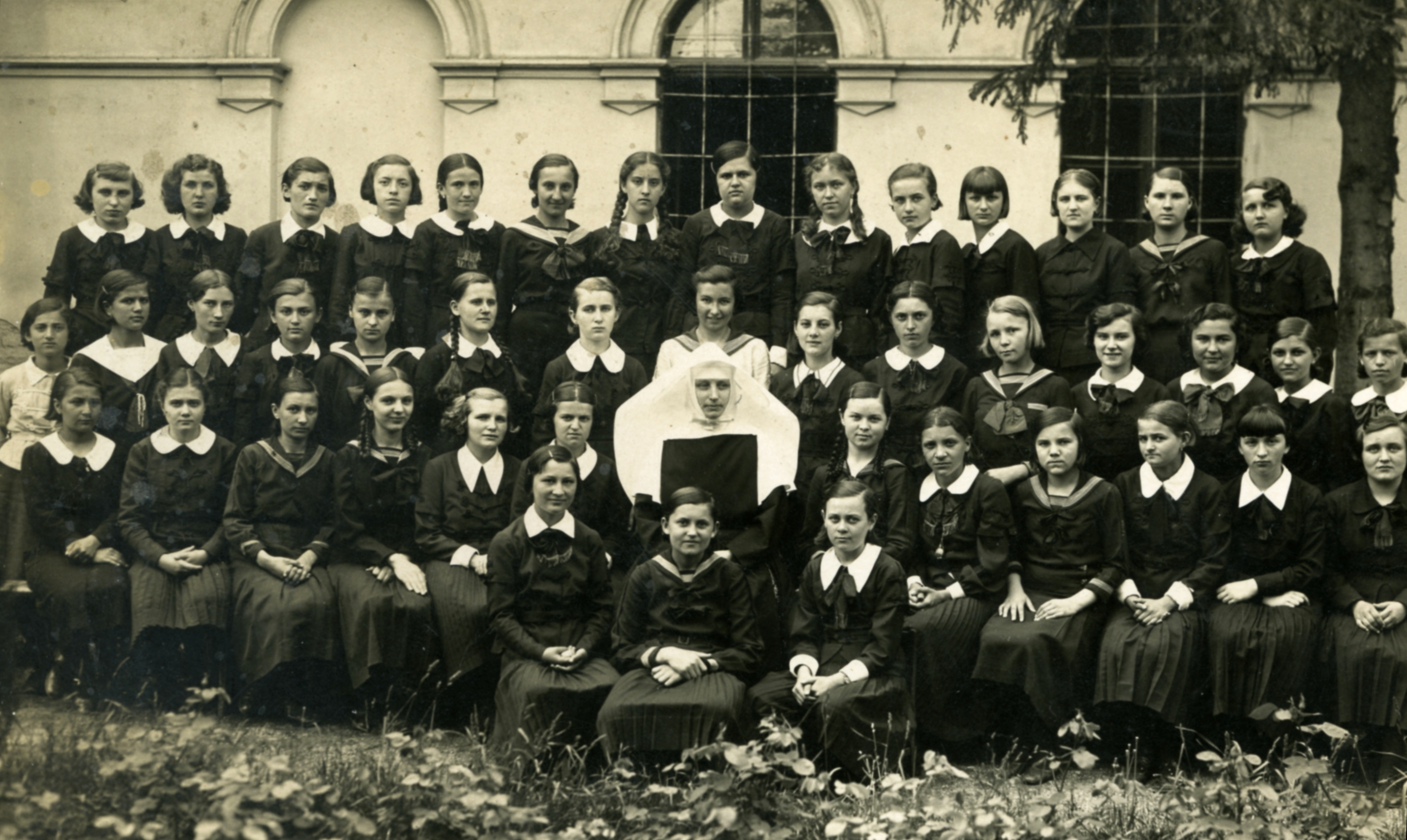 Lehel vezér tér 7., Zárda és Érseki Leánynevelő Intézet (ma Nagyboldogasszony Kéttannyelvű Katolikus Iskola). Location: Hungary, Jászberény Tags: class photo, nun, church, girls' class Title: Lehel vezér tér 7., Zárda és Érseki Leánynevelő Intézet (ma Nagyboldogasszony Kéttannyelvű Katolikus Iskola).